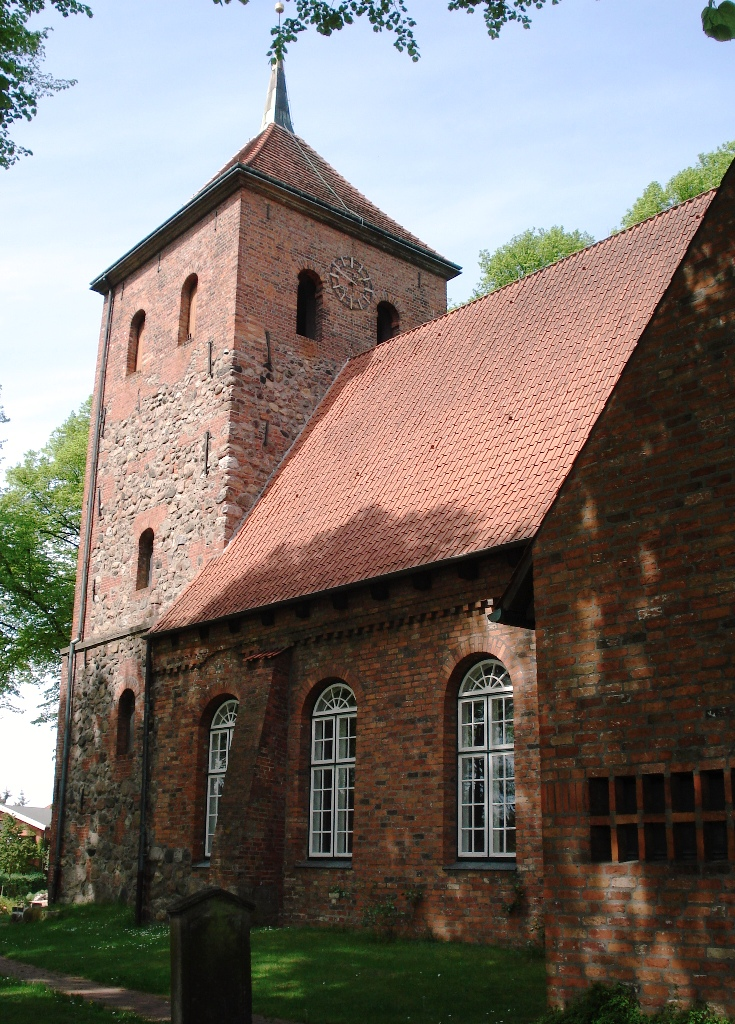 Die Rensefelder Kirche aus Süden